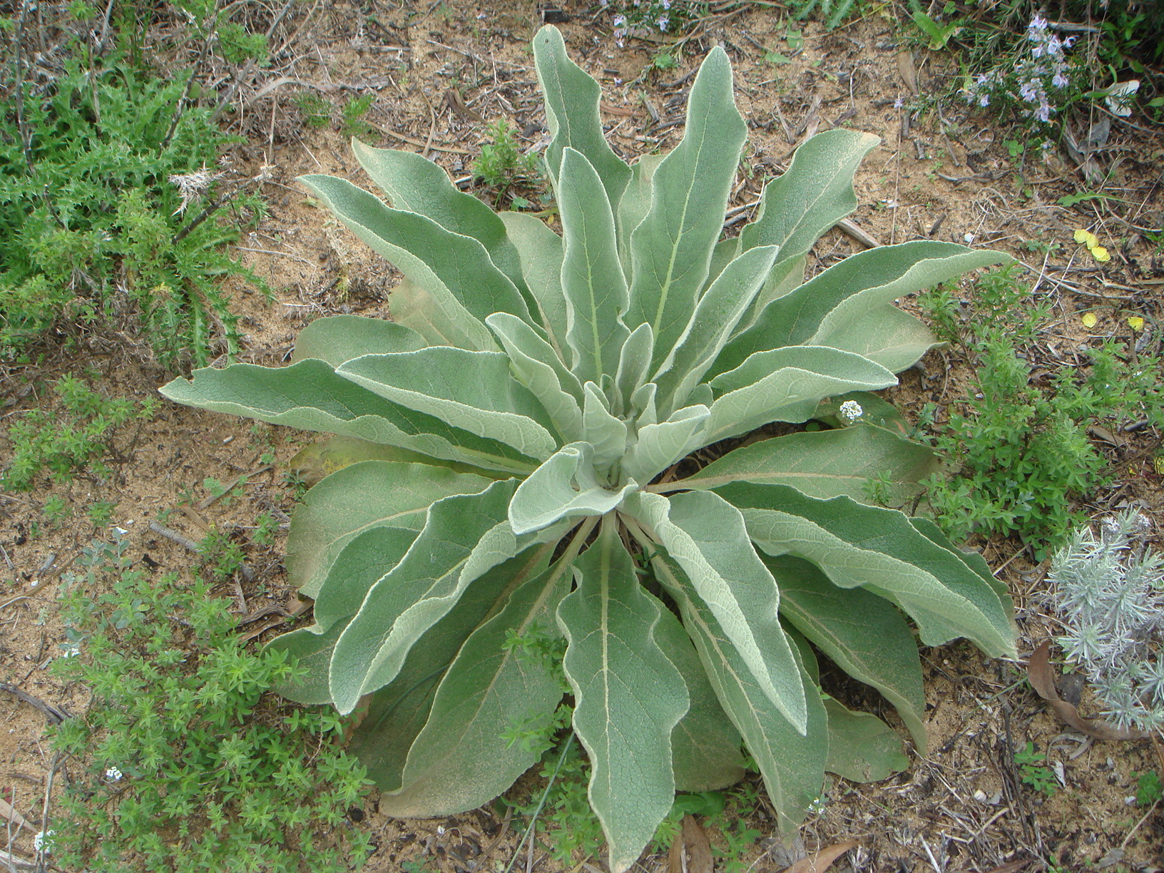 (Verbascum giganteum), Chiclana (Cádiz) España